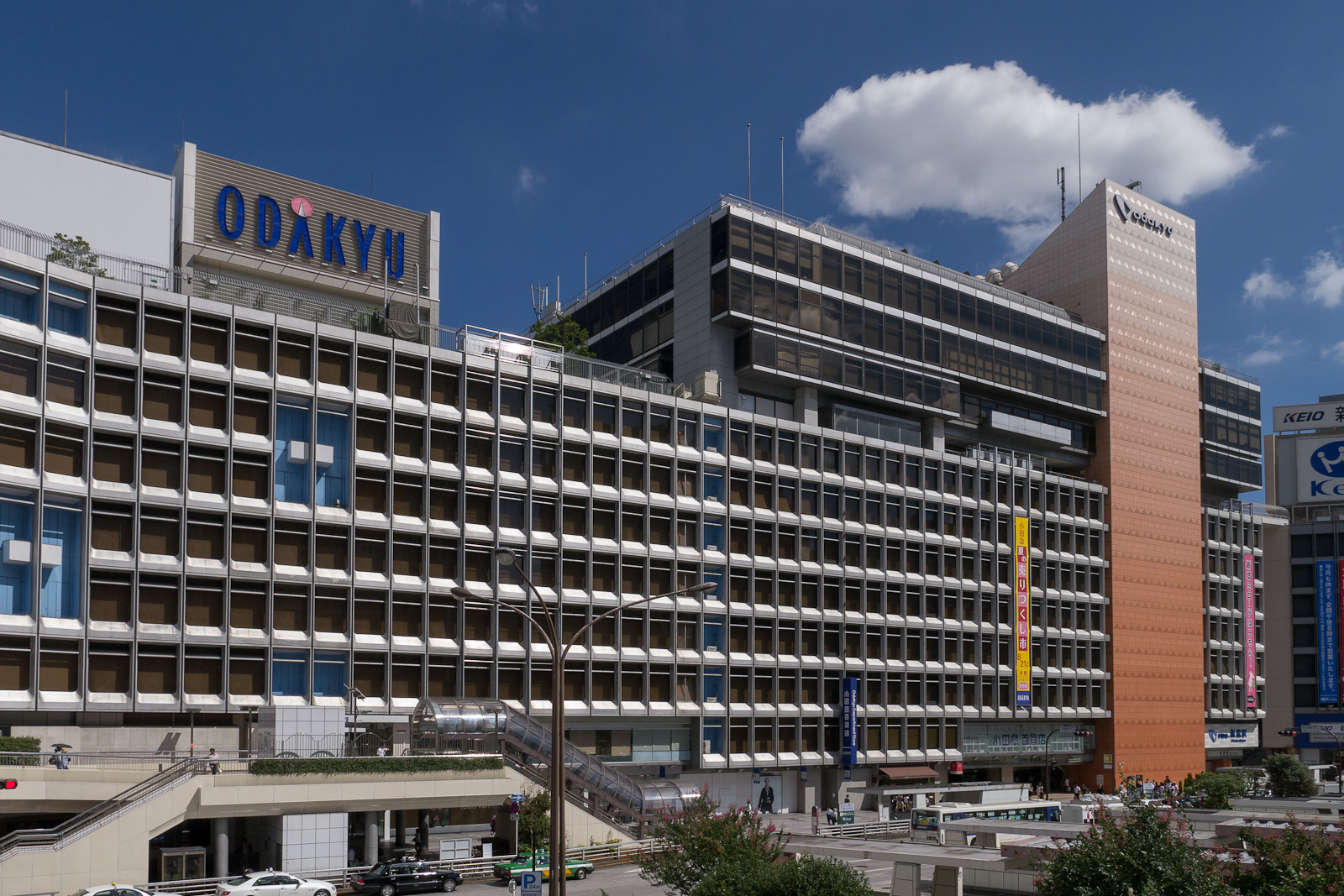 新宿駅西口、小田急百貨店。